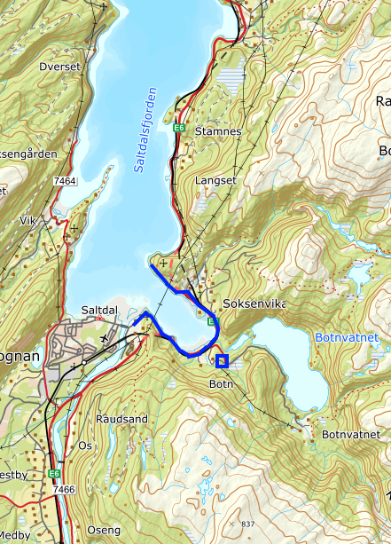 Map showing blood road with blue streak. Blue square marks the POW camp. Saltdal, Nordland, Norway.